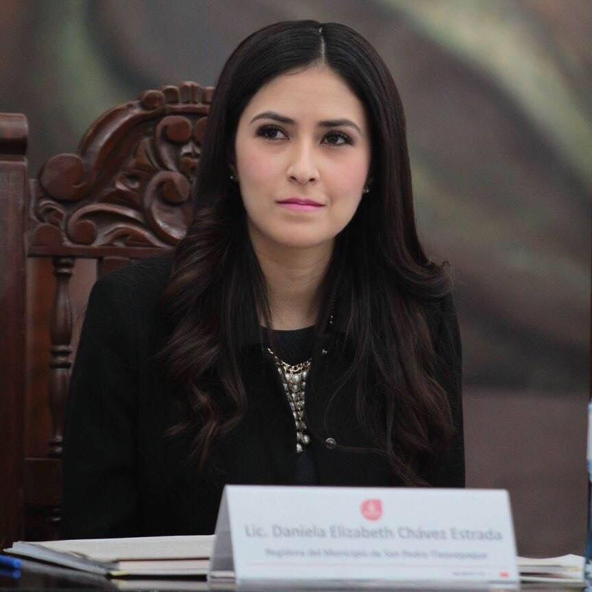 Dani Chávez en sesión de cabildo